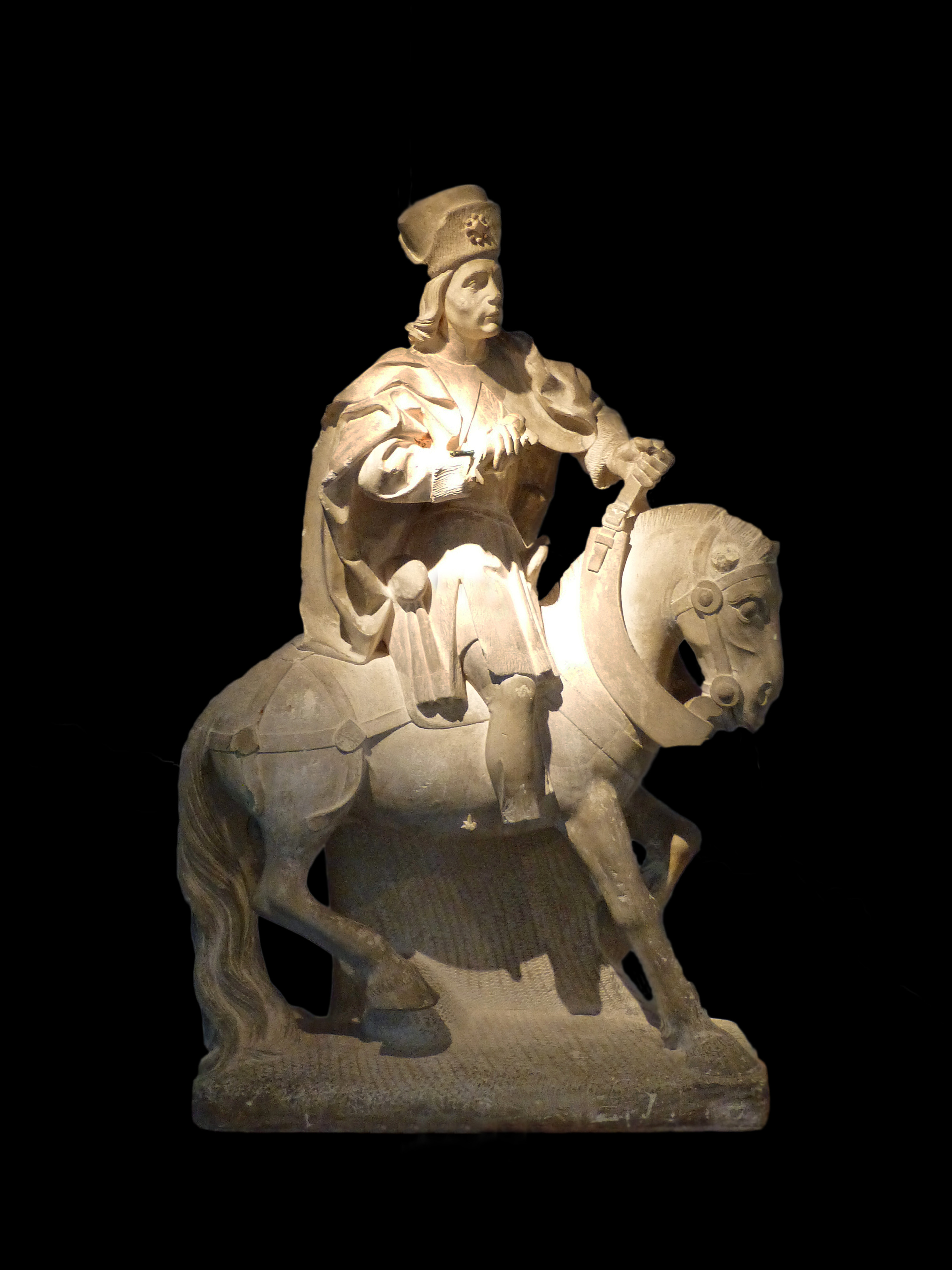 Un seigneur à cheval, XVe siècle. Provient de l'église de Girmont (Vosges). Musée départemental d'art ancien et contemporain.